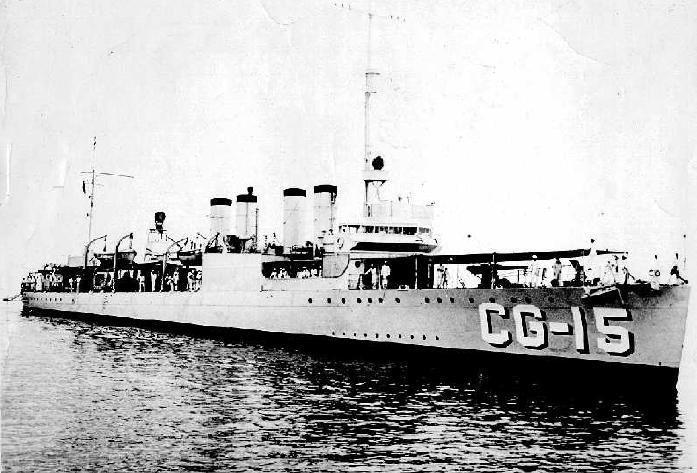 USS Abel P. Upshur (DD-193)